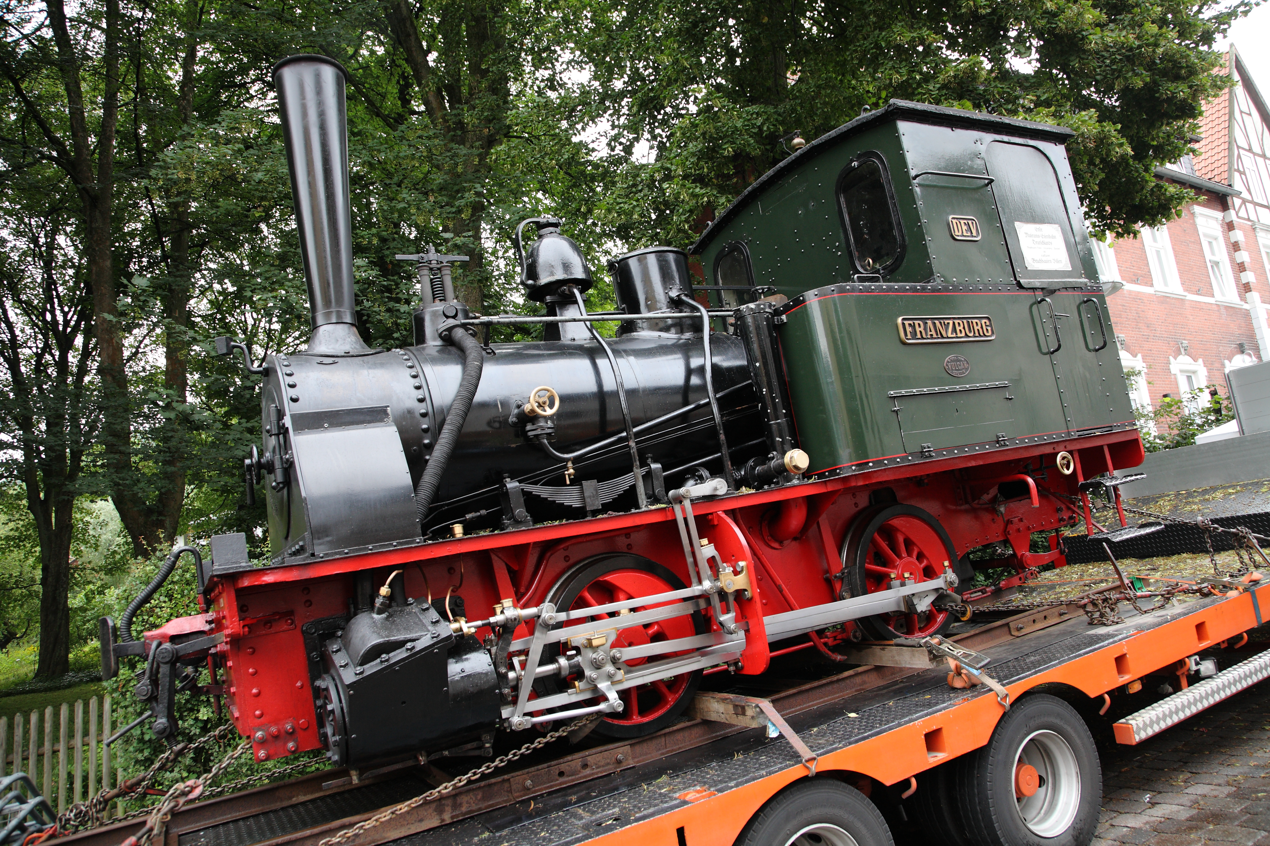 Viaduktfest in Altenbeken